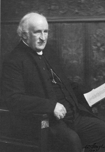 Amalric-Frédéric Buscarlet (1836-1928), pasteur de l’Église écossaise